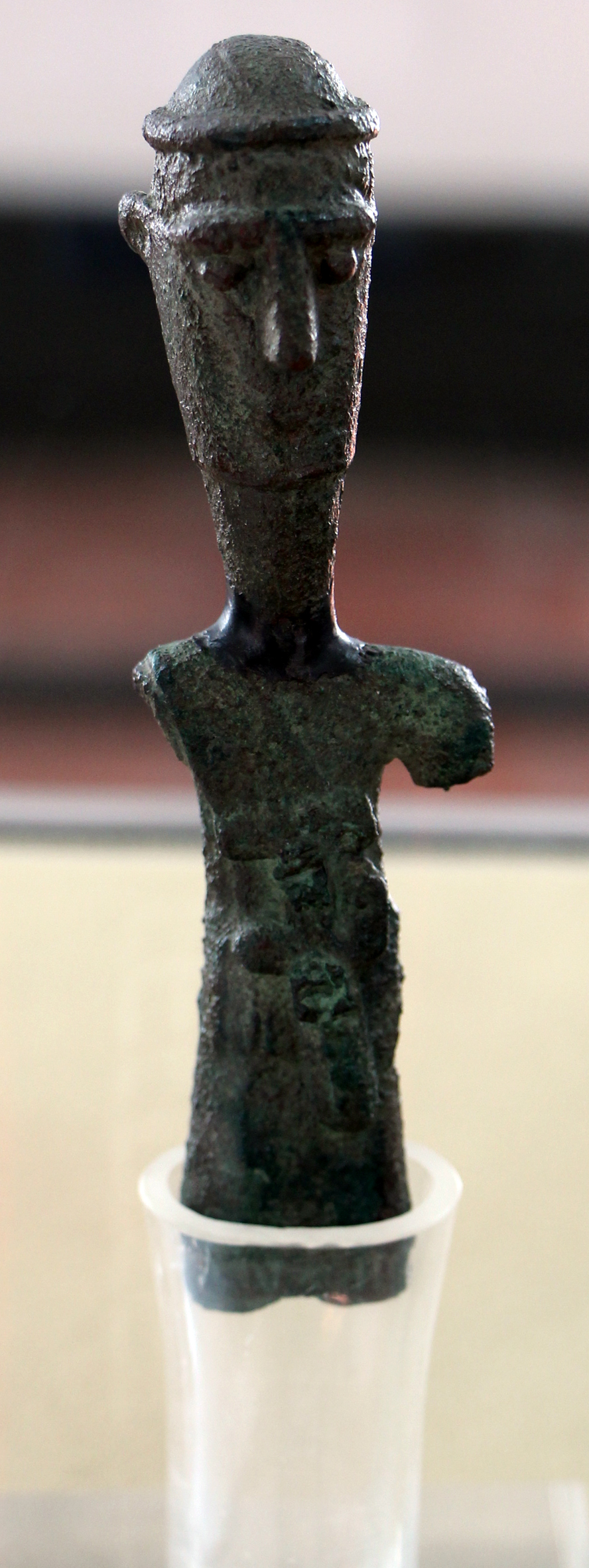 Museo archeologico nazionale G.A. Sanna - MIBAC The making of this document was supported by Wikimedia CH. (Submit your project!) For all the files concerned, please see the category Supported by Wikimedia CH. This is a photo of a monument which is part of cultural heritage of Italy.